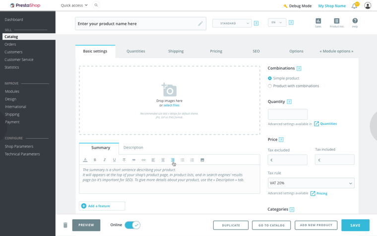 Prestashop admin 1.7